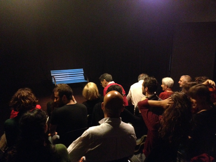 Obra de teatro en la Sala Porta4 de Barcelona. C/ Església, 4 (local 6)